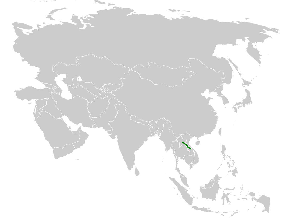 Pycnonotus hualon distribution map, based on